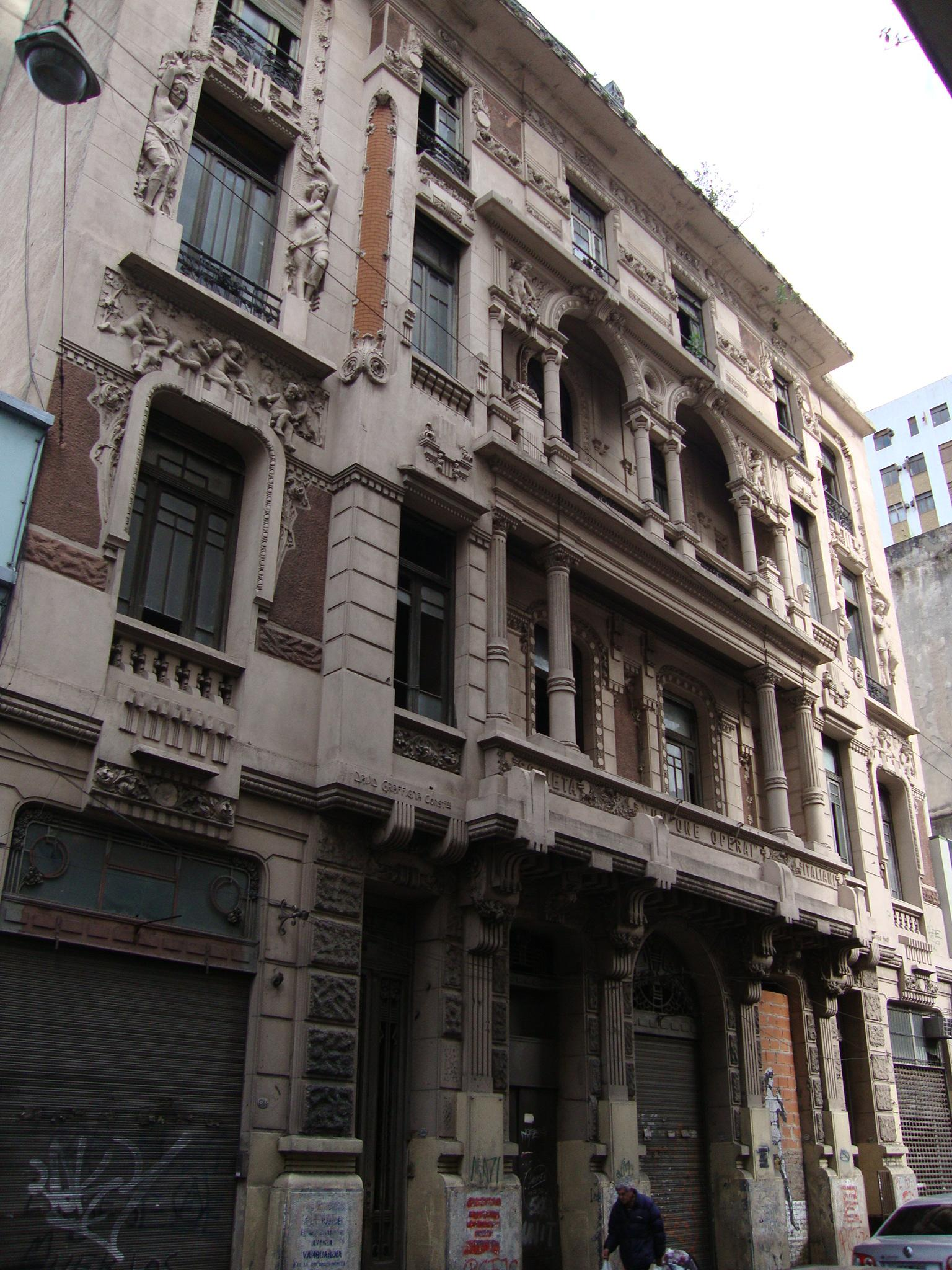 Sede de la Societá Unione Operai Italiani, en la calle Sarmiento 1374. En la actualidad está sin uso y en grave deterioro. Arquitecto: Virginio Colombo Estilo: Liberty milanés Año: 1914 Buenos Aires, Argentina.